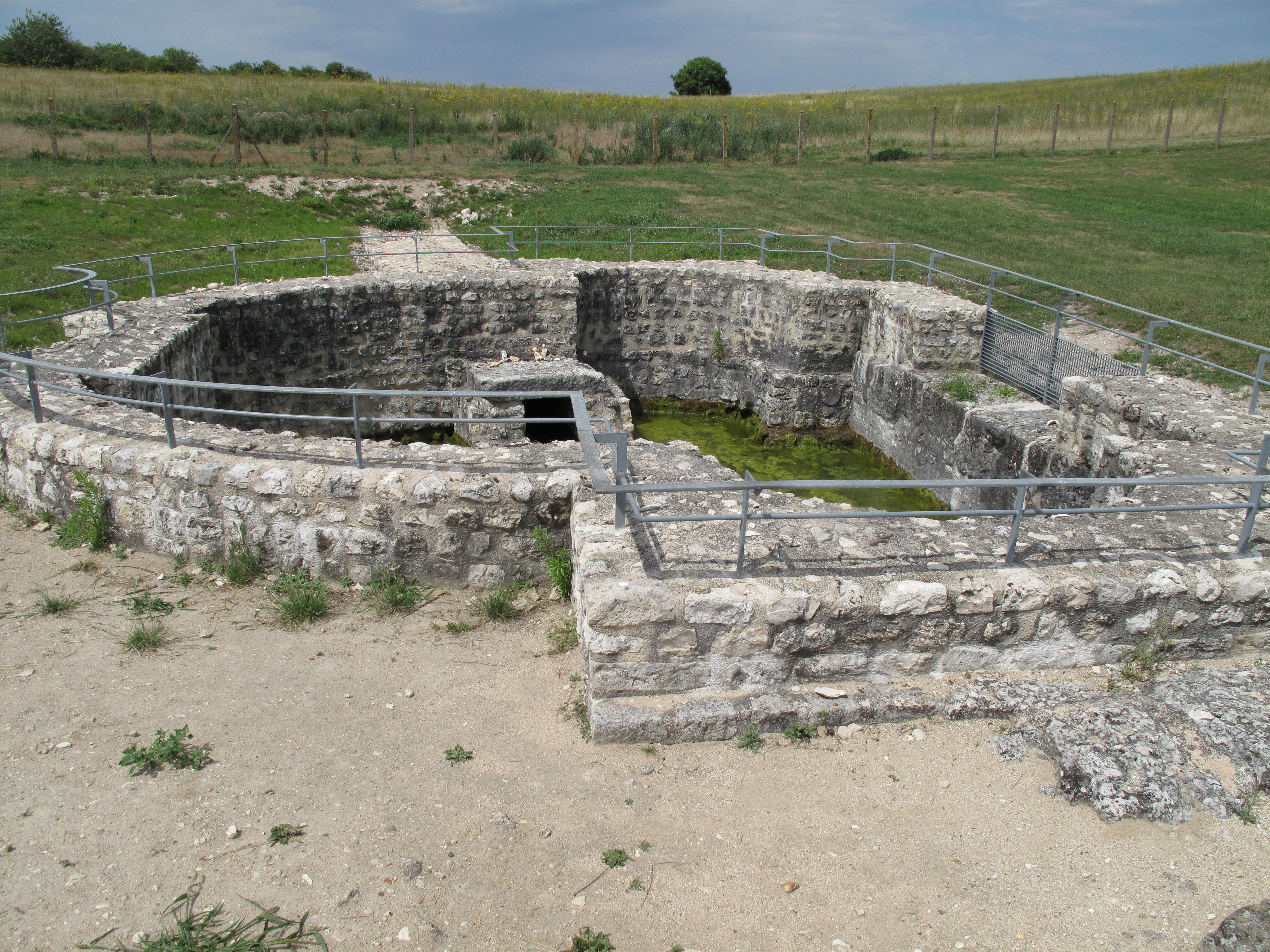 Bassin sacré, Aquis Segeste, Loiret, France